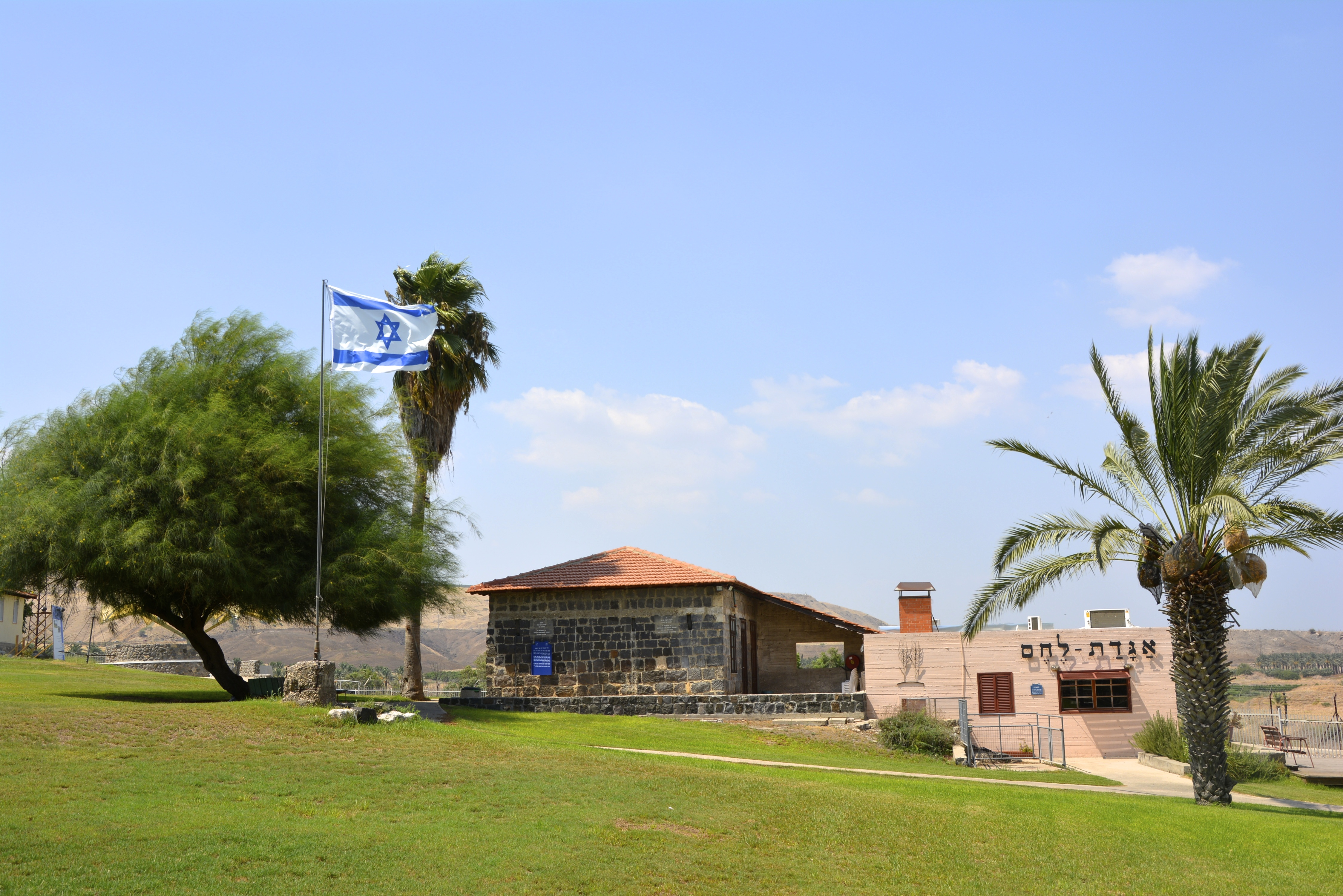 חצר גשר הישנה בקיבוץ גשר